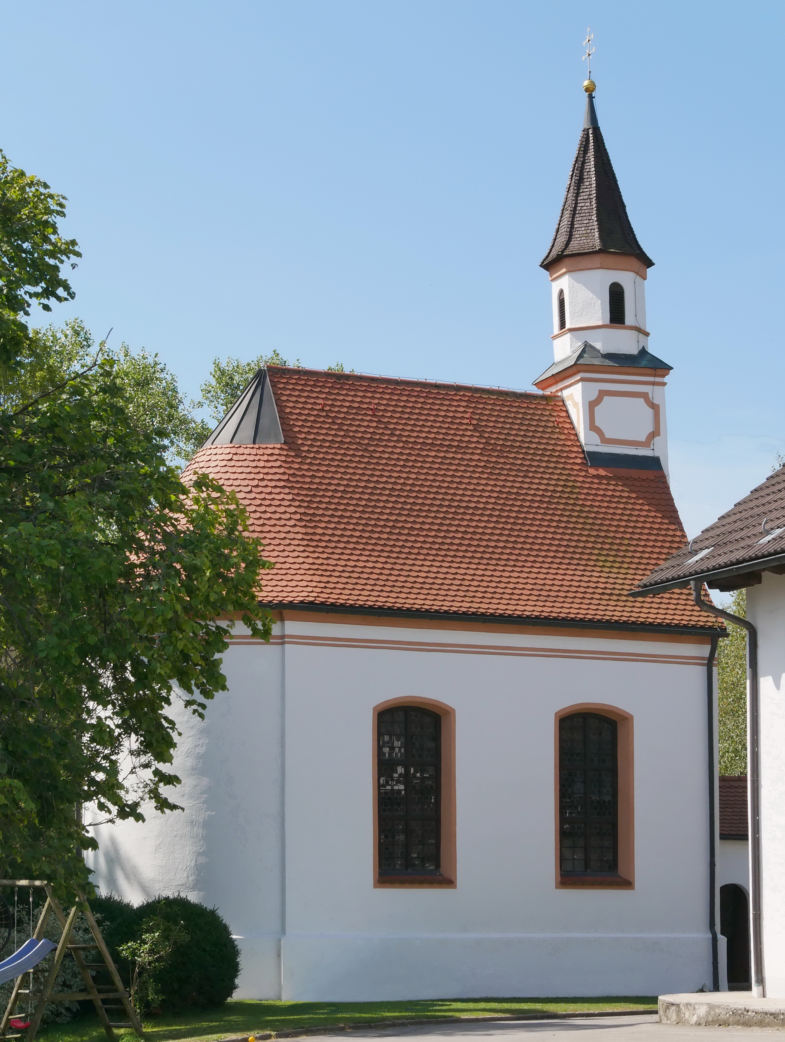 Dießen-Unterbeuern_Kapelle St. Magnus. Ansicht von Nord-Osten